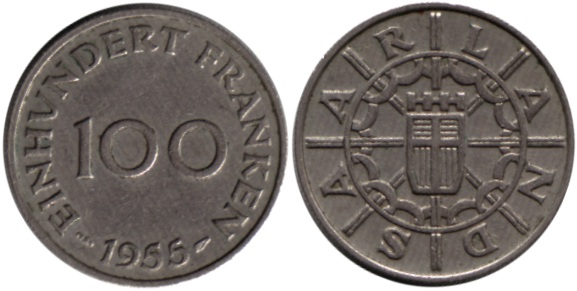 100 Saar-Franken Münze